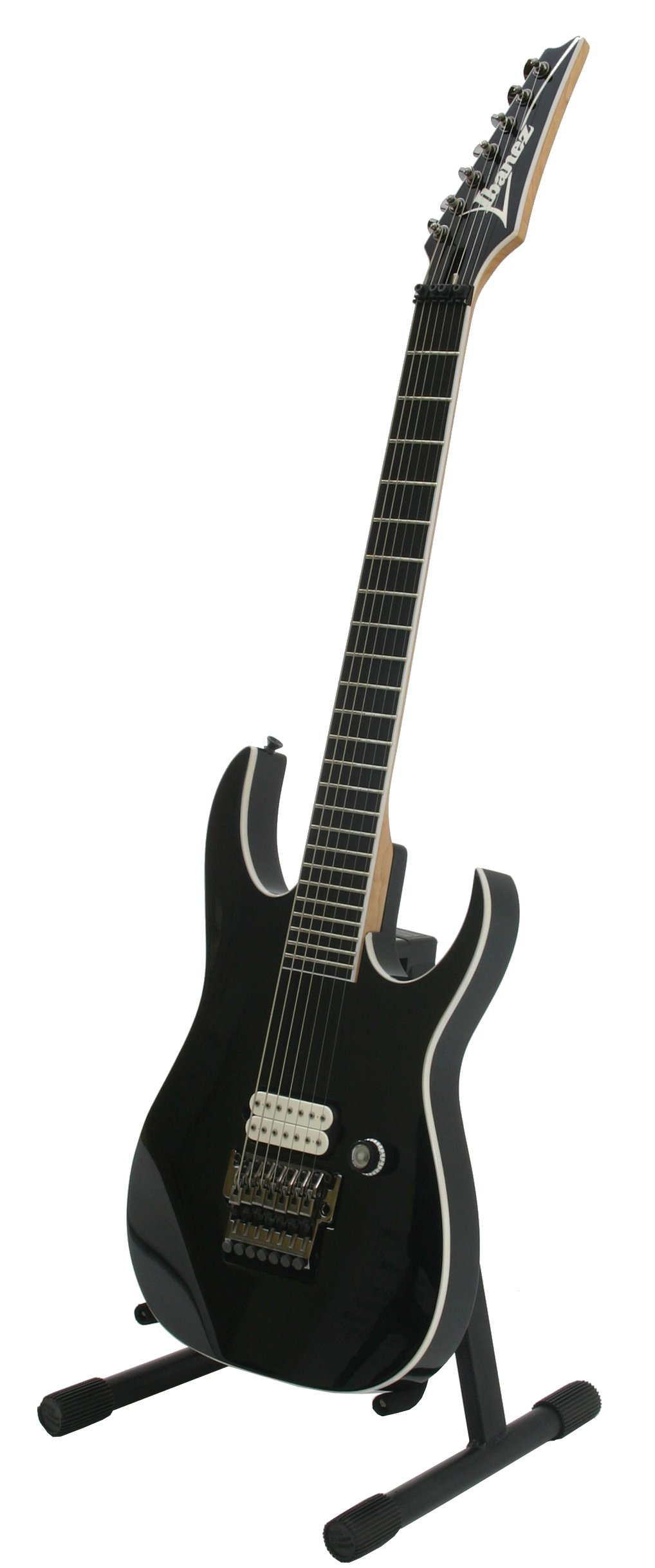 Ibanez Junior